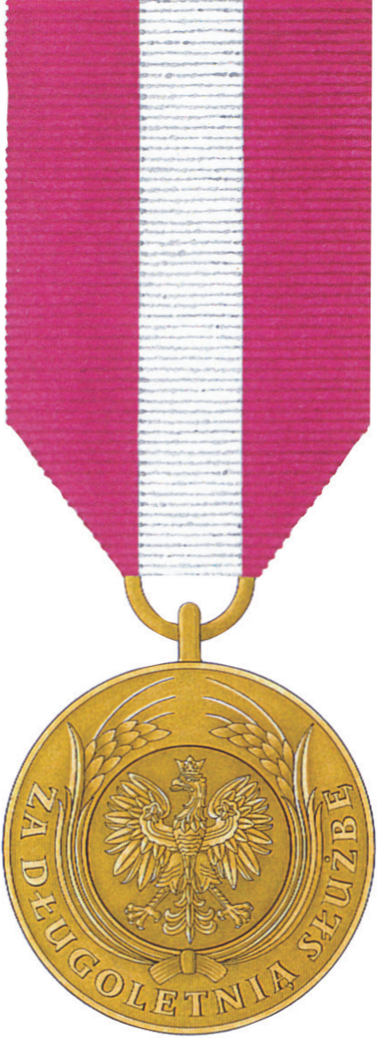 Złoty Medal za Długoletnią Służbę. Awers.